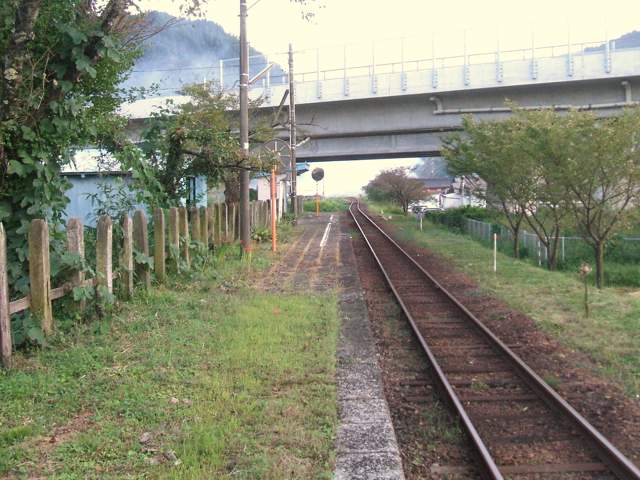 ホームの様子